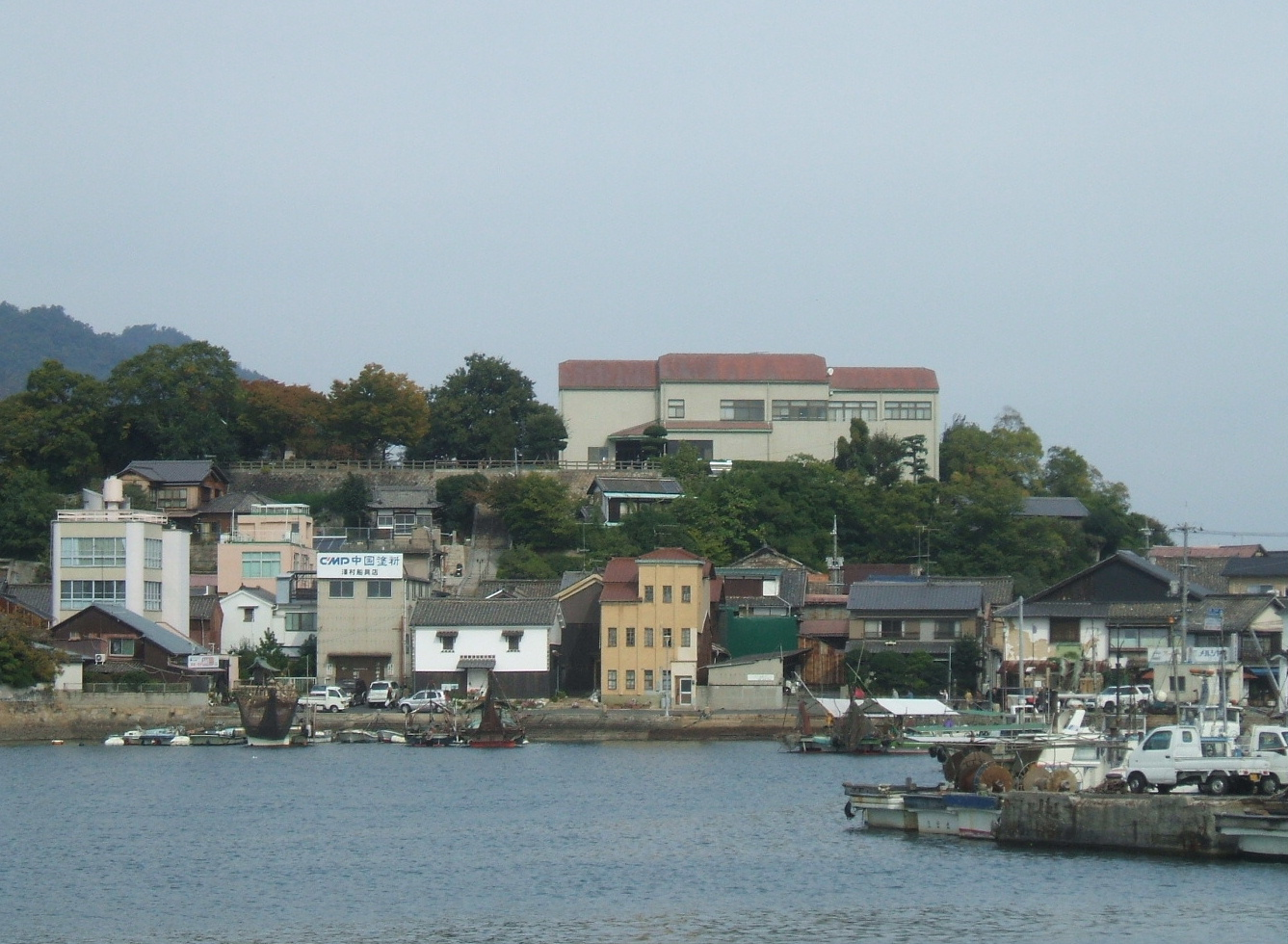 広島県福山市にある跡。中央の建物は本丸跡にあるである。